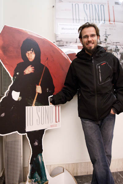 Il regista Segre durante una presentazione di "Io sono Li".